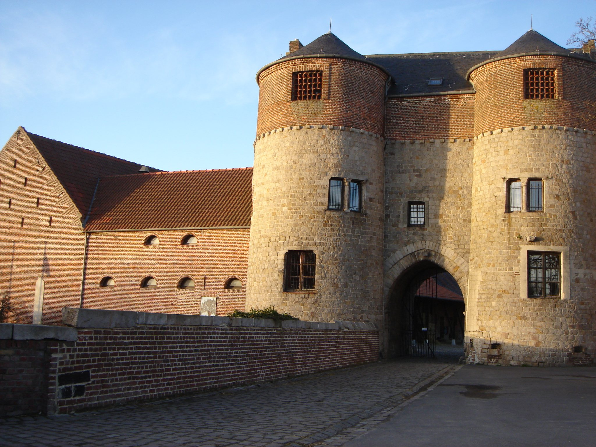 Chateau Montmorency Montigny-en-ostrevent XIIIéme siecle